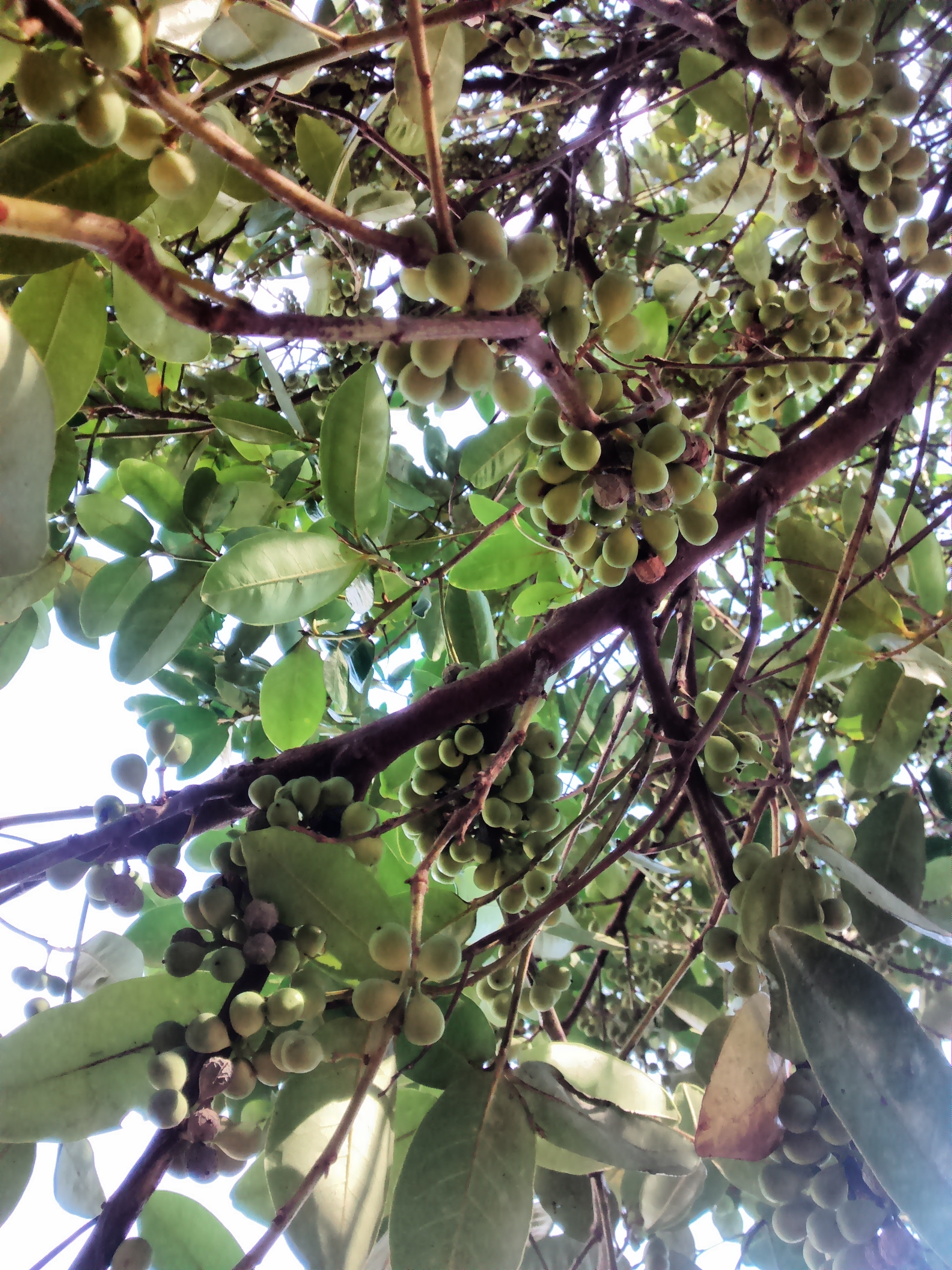 Pera glabrata do Bolsão de estacionamento da BCCL - unicamp, Campinas (SP) - BR.